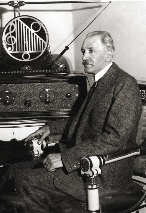 Ignacy Mościcki (1867-1946) - President of Poland (1926-1939)